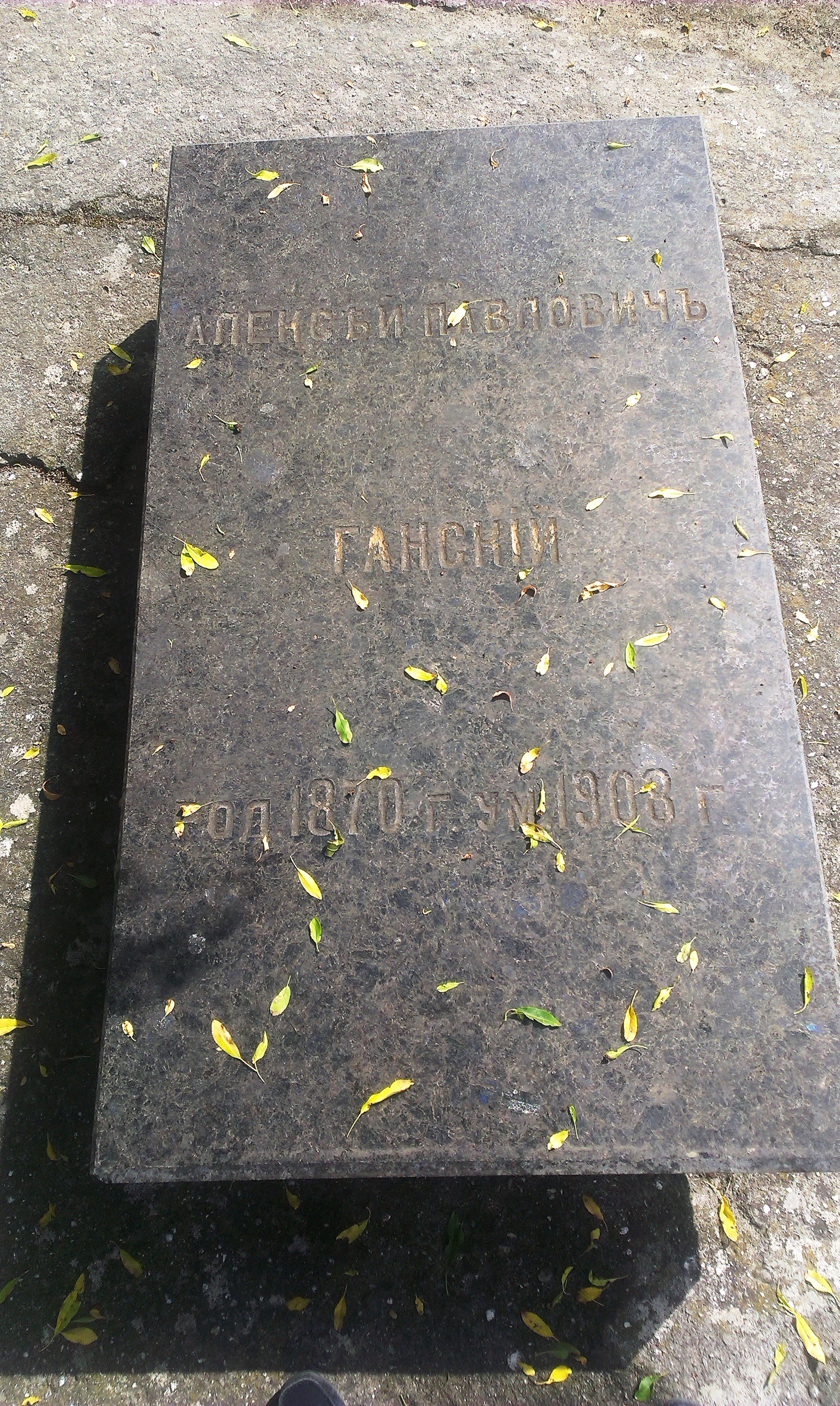 Поликуровский мемориал